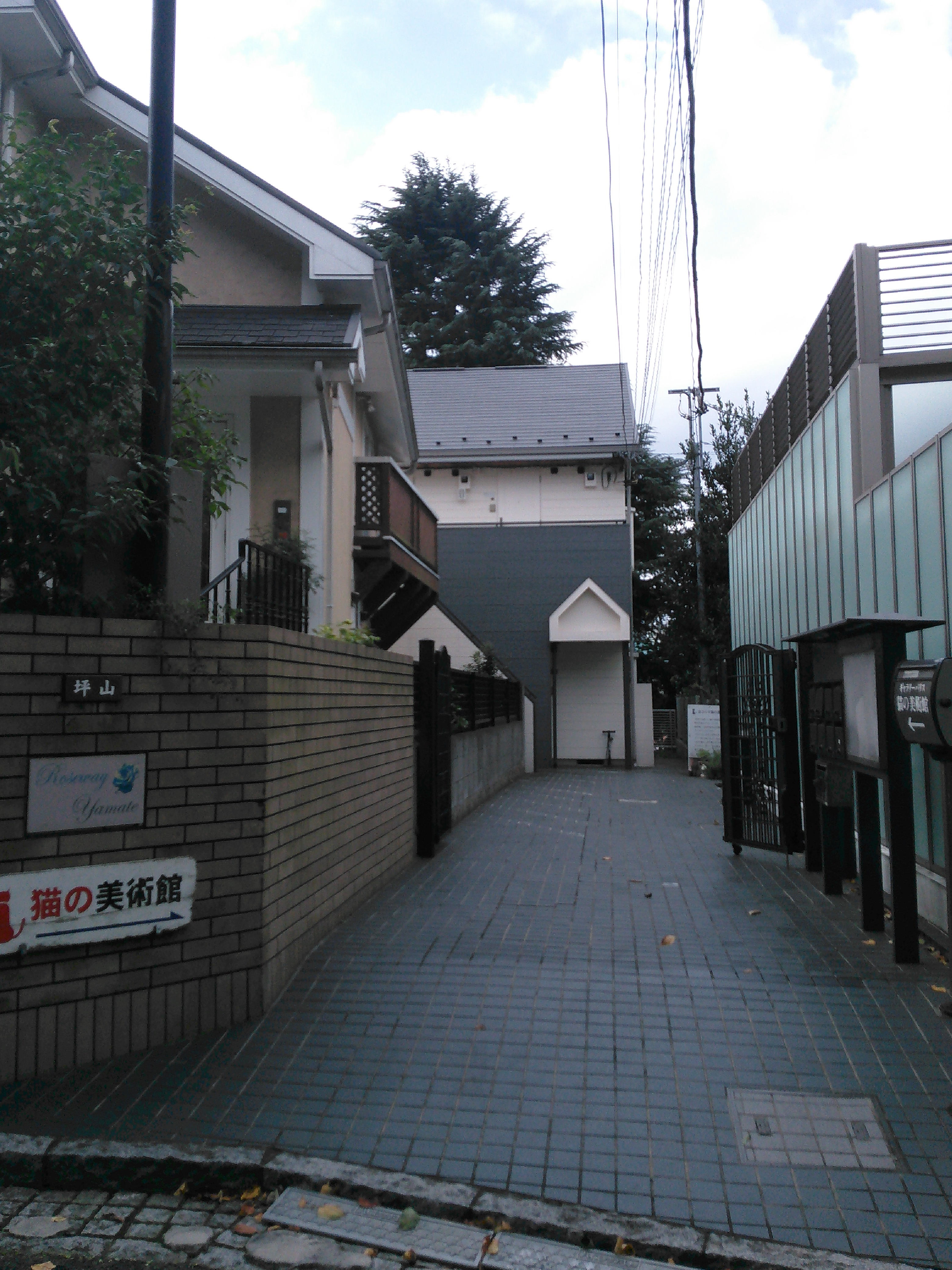 横浜・山手、ヨコハマ猫の美術館